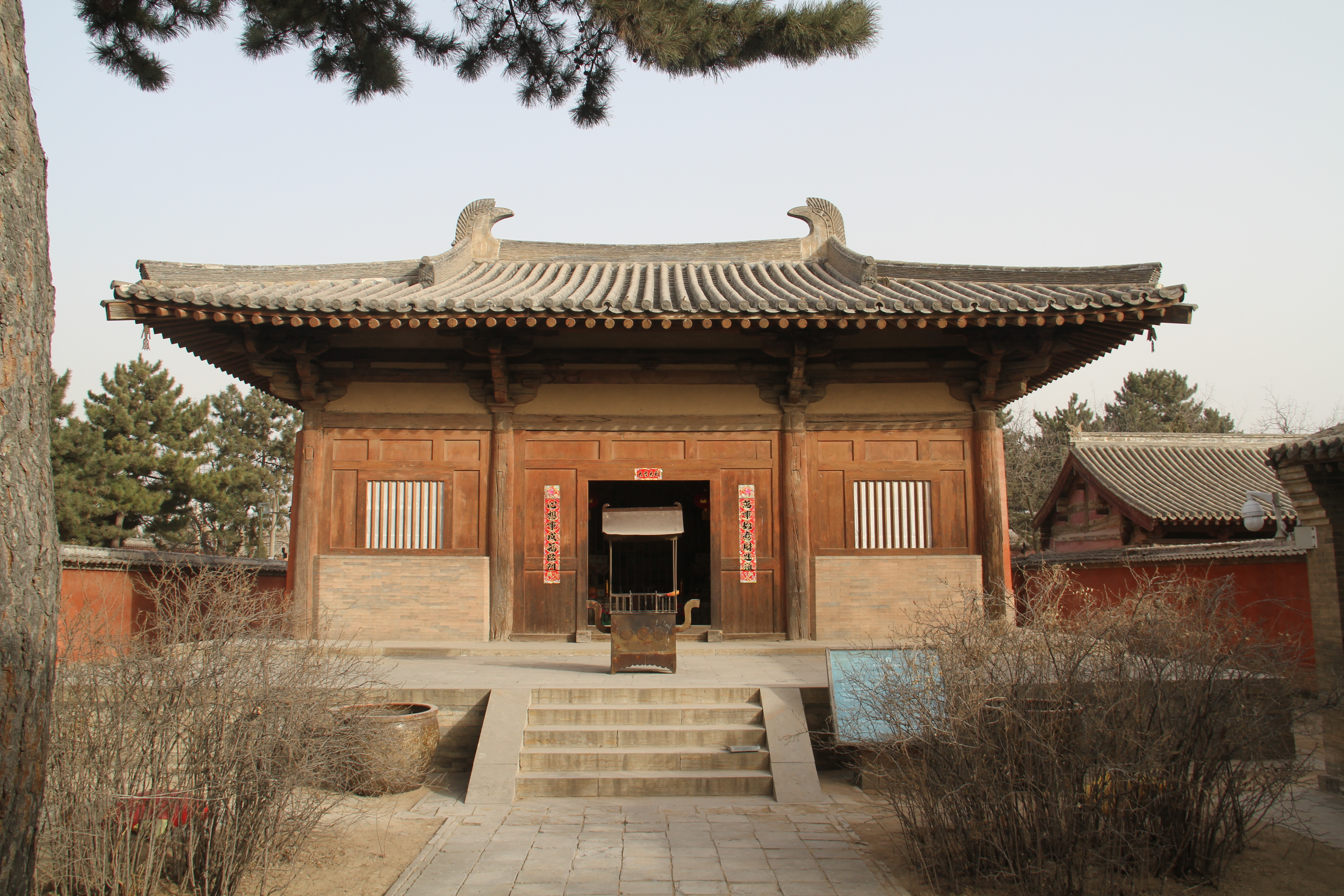 中文（中国大陆）: 位于山西省忻州市五台县的南禅寺大殿，是中国已发现的历史最为悠久的木构建筑。